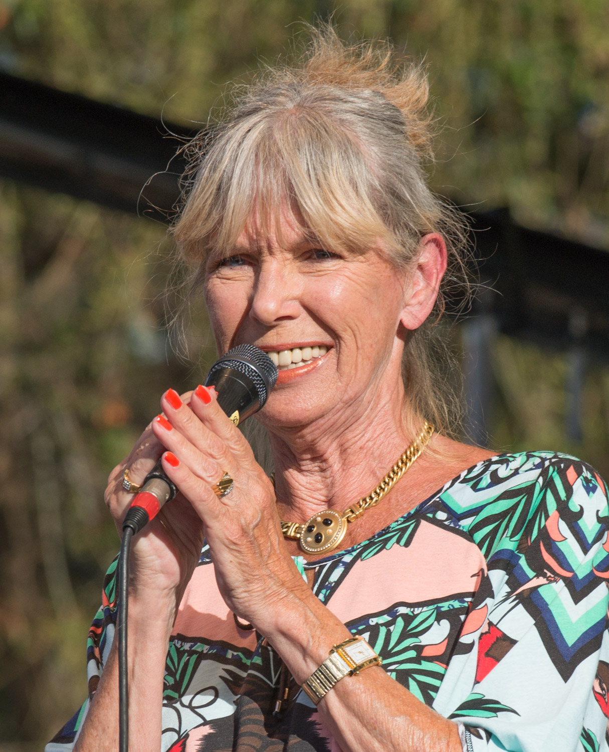 Annica Risberg med Ballroom Big Band i Kungsträdgården i Stockholm den 22 juli 2015.